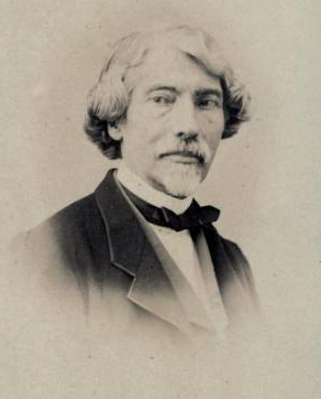 Riproduzione foto di Andre Maffei